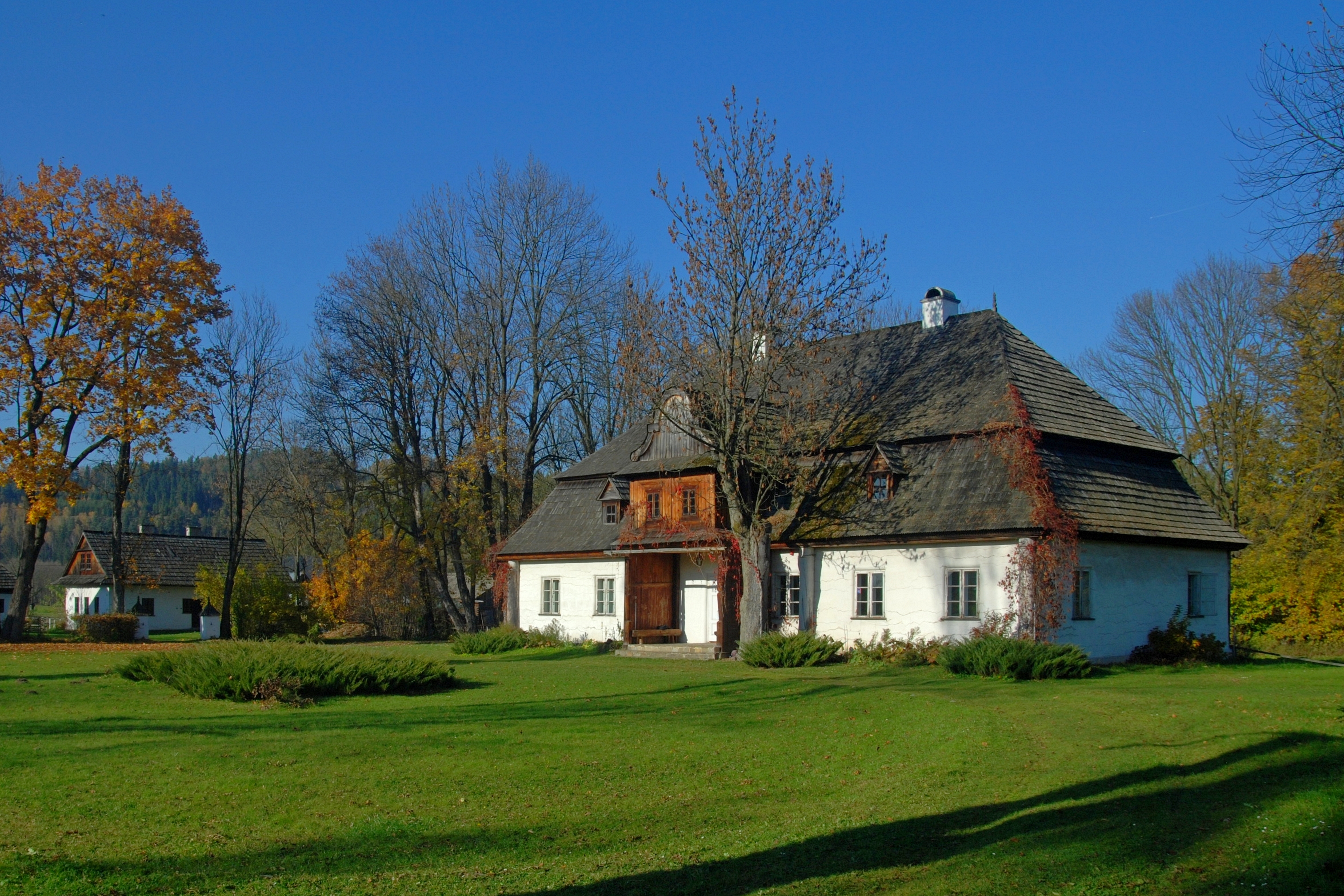 wieś Łopuszna